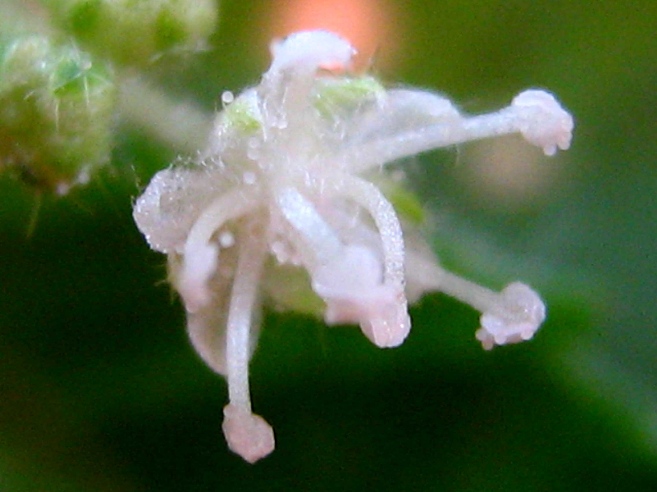 Croton lundianus (Didr.) Müll. Arg.